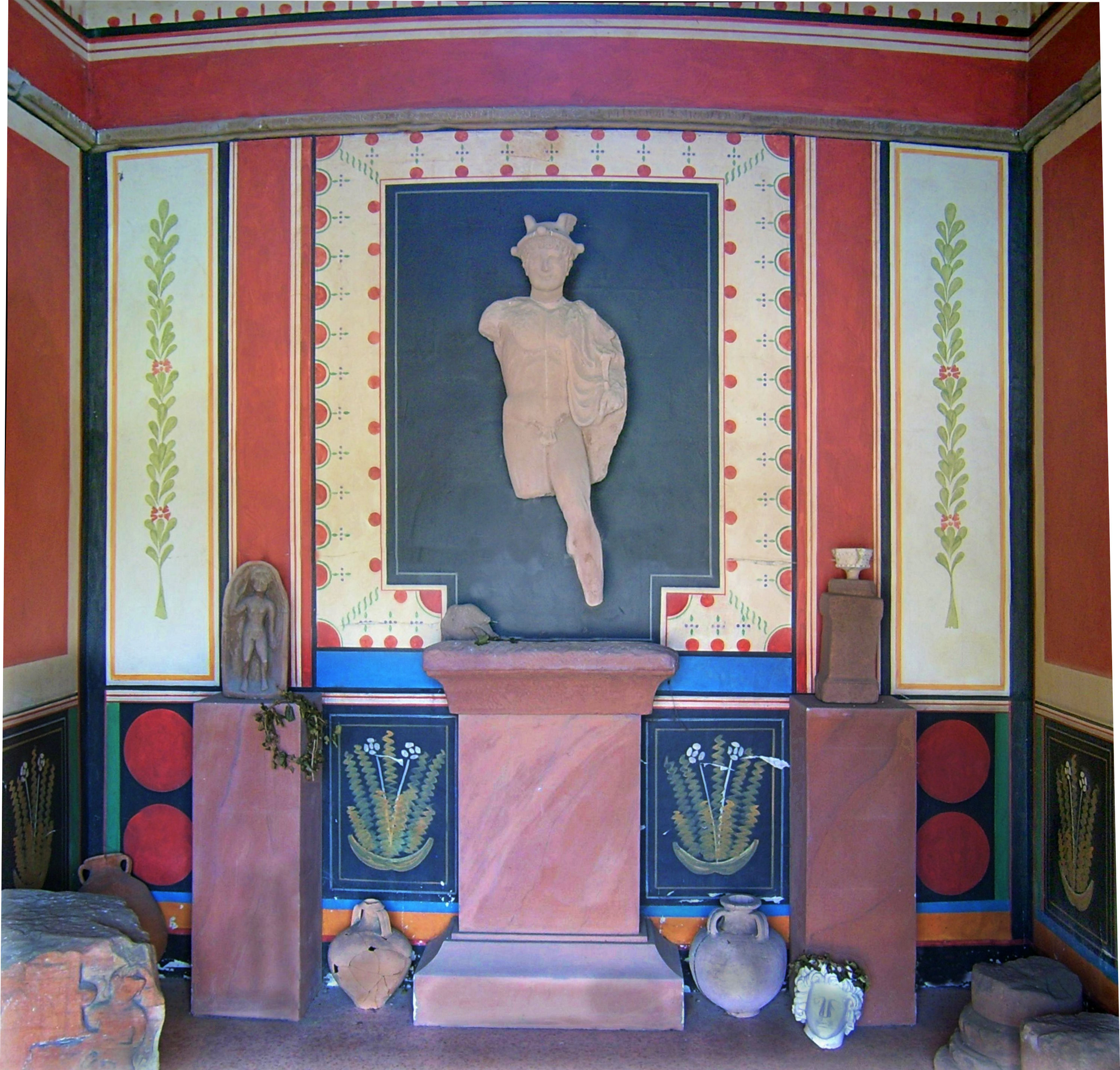 Innenansicht des Römisch-Gallischer Tempels in Schwarzenacker, Jupiter, roman